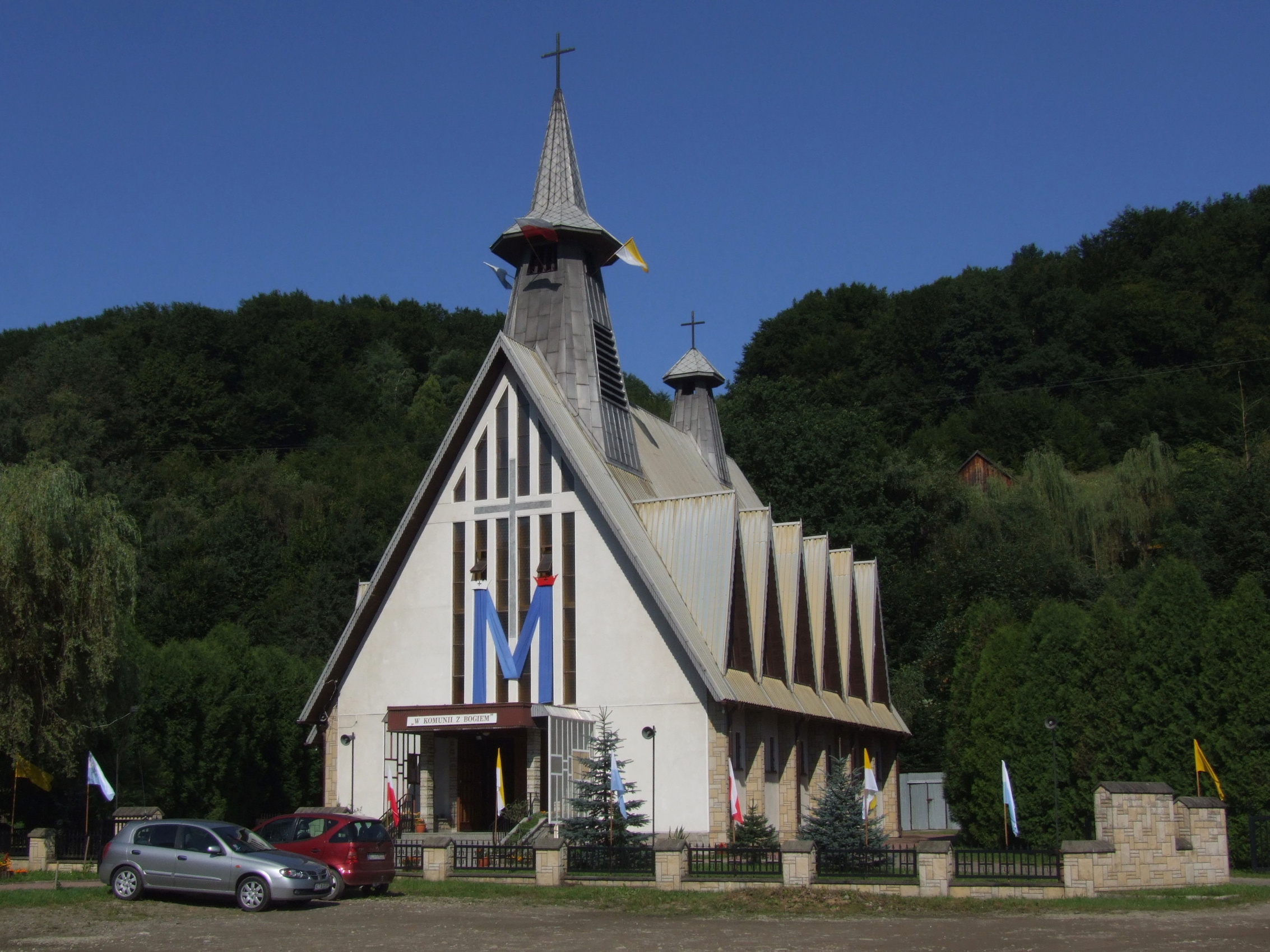 Młynne. Kościół